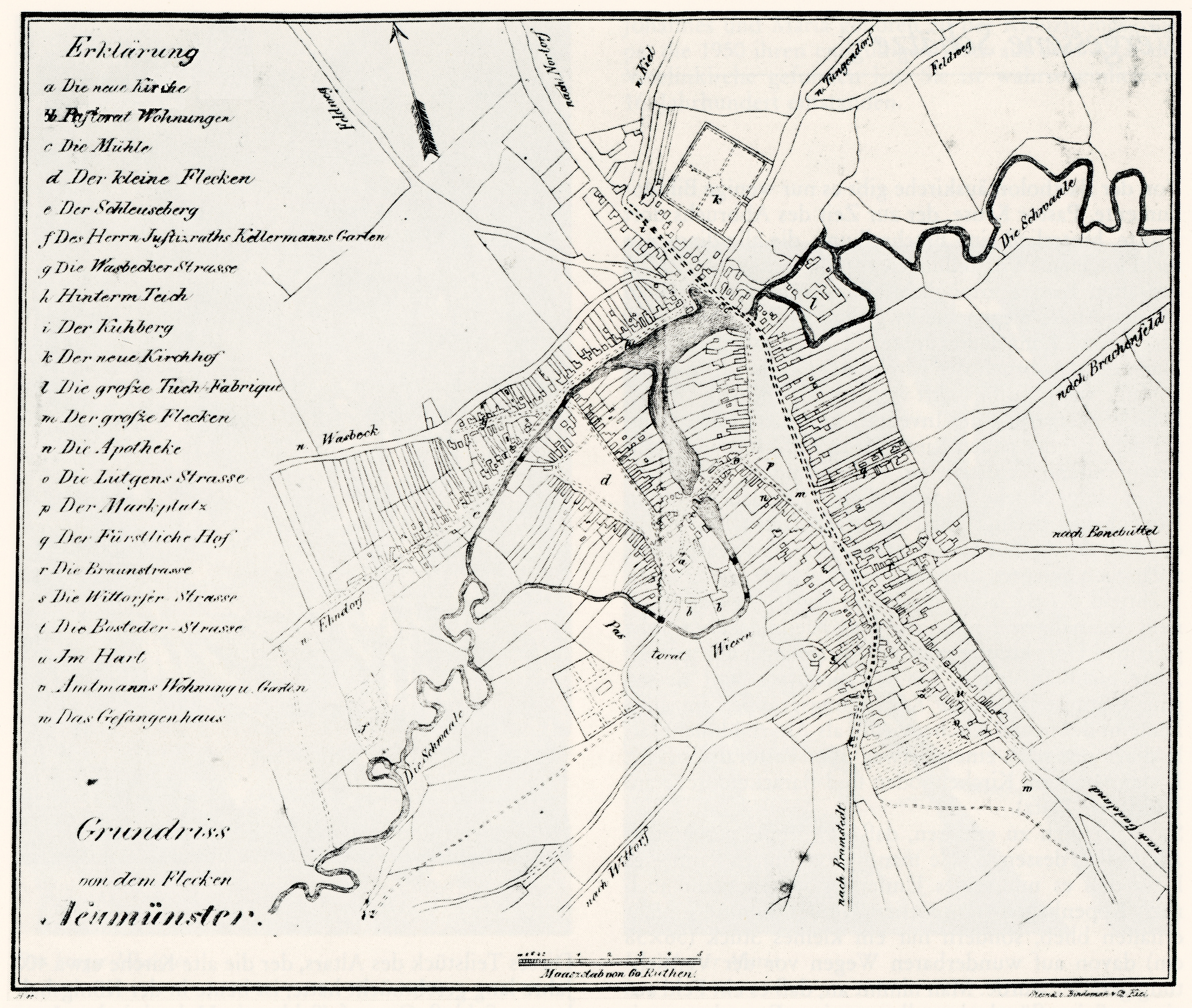 Neumünster im Jahr 1836 nach Ernst Christian Kruse: Topographie des Fleckens Neumünster.